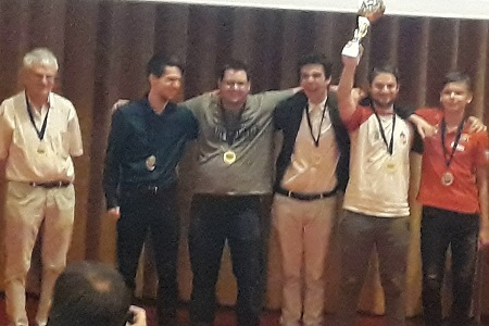 Siegerteam aus Ungarn, Mitropa Cup 2019 in Radenci. Erster von links ist Captain: GM Ribli Zoltan.